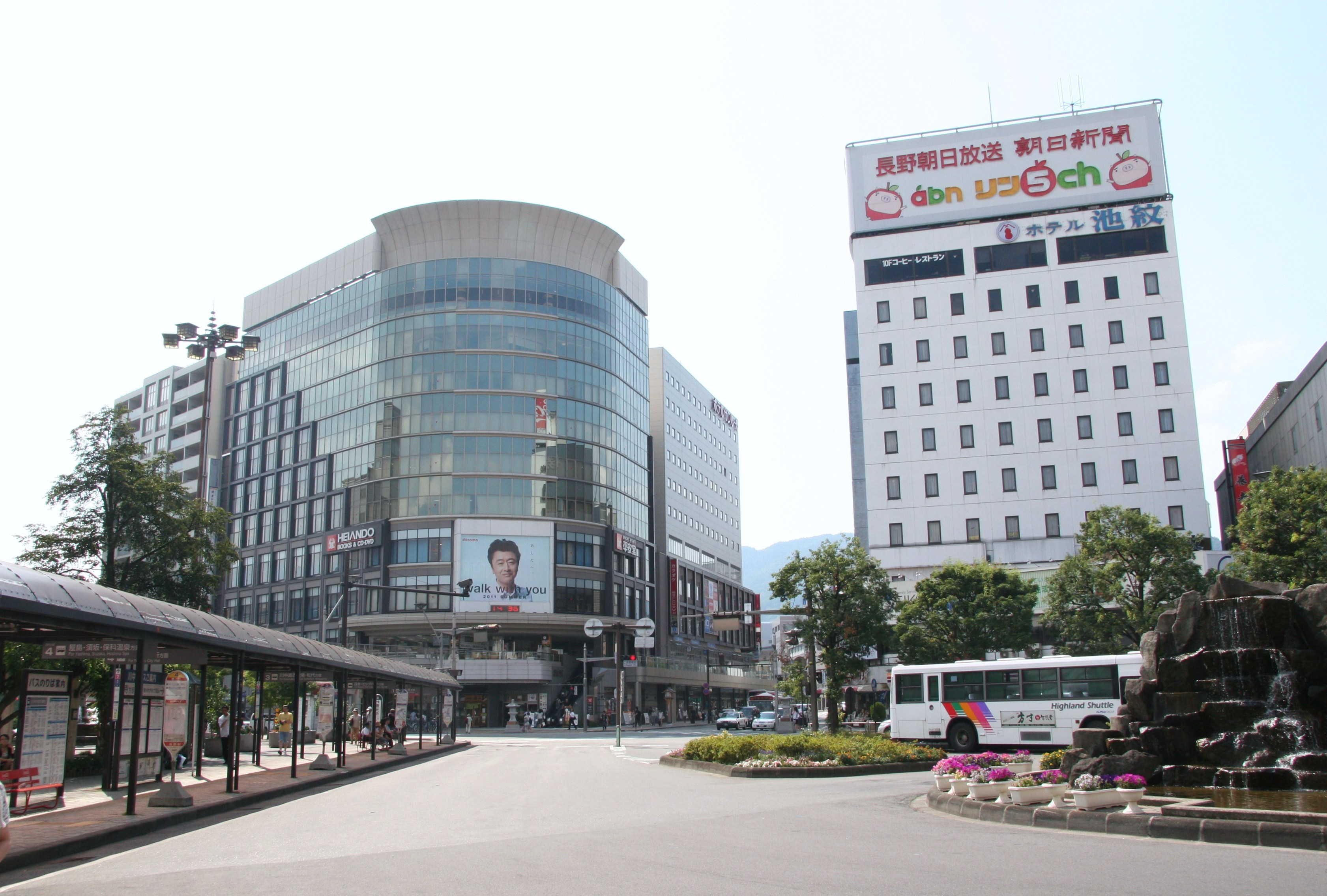 Nagano Station